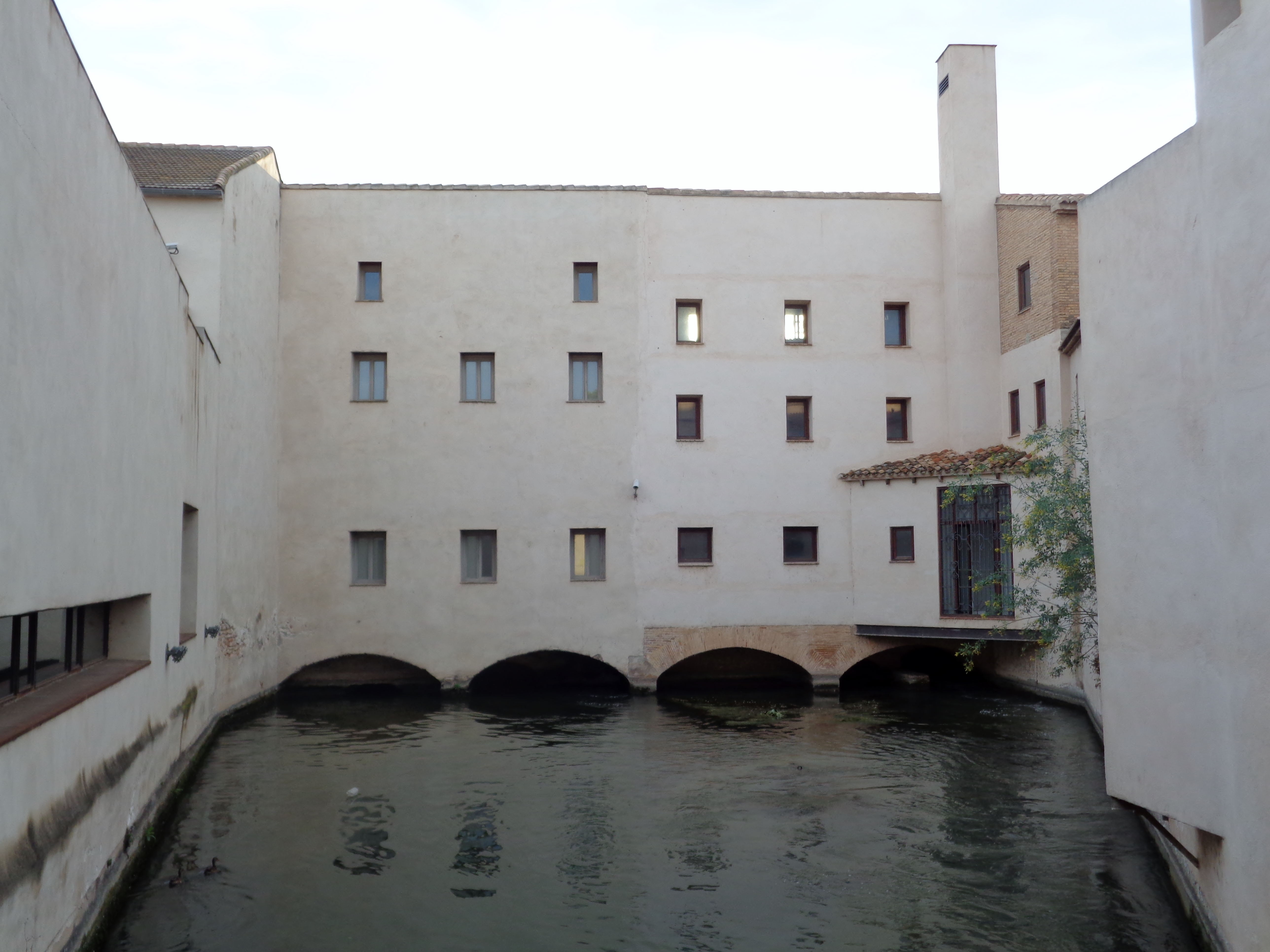 Paterna.